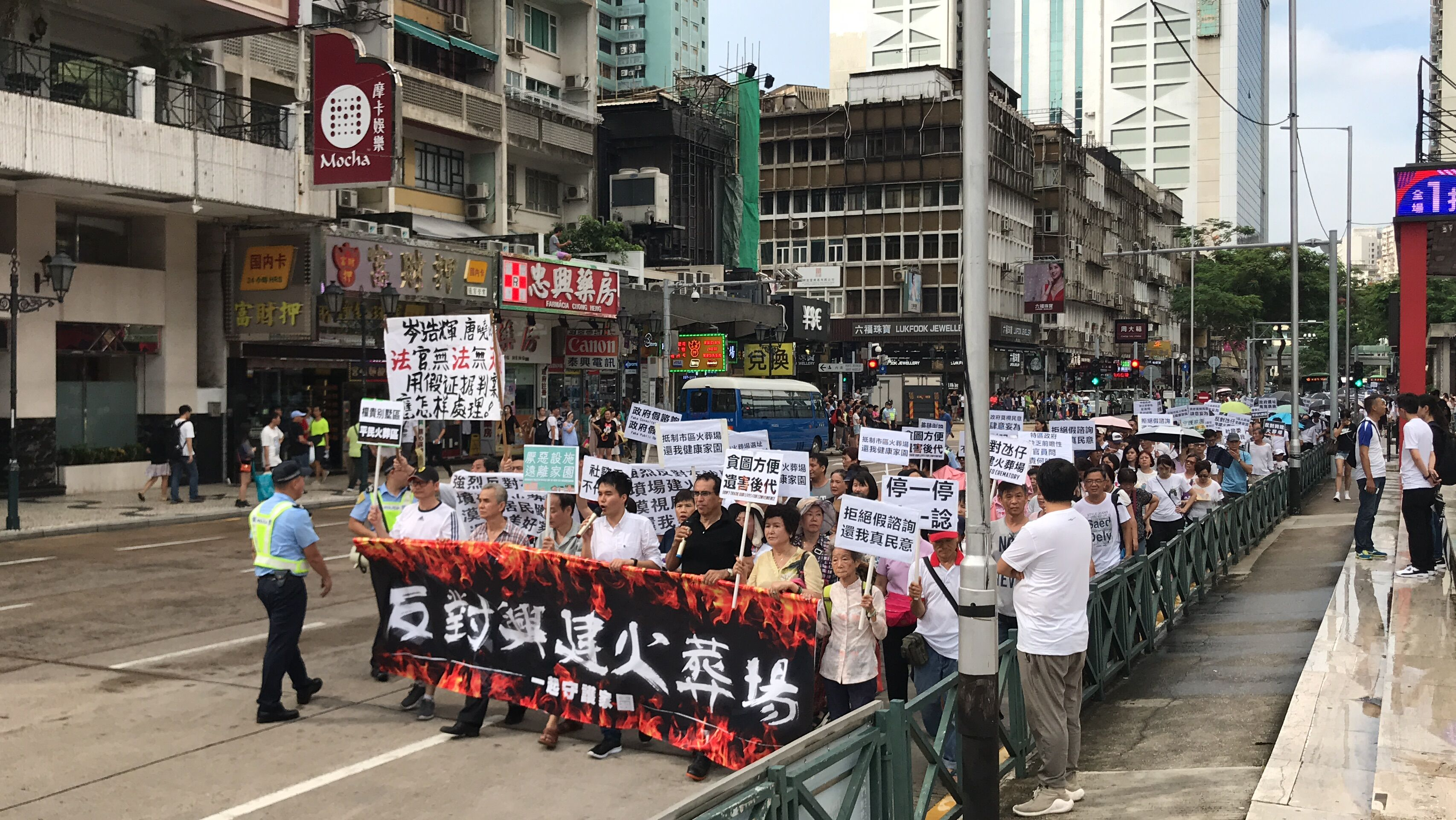 是當局在整個廣場中准許的遊行集合地點